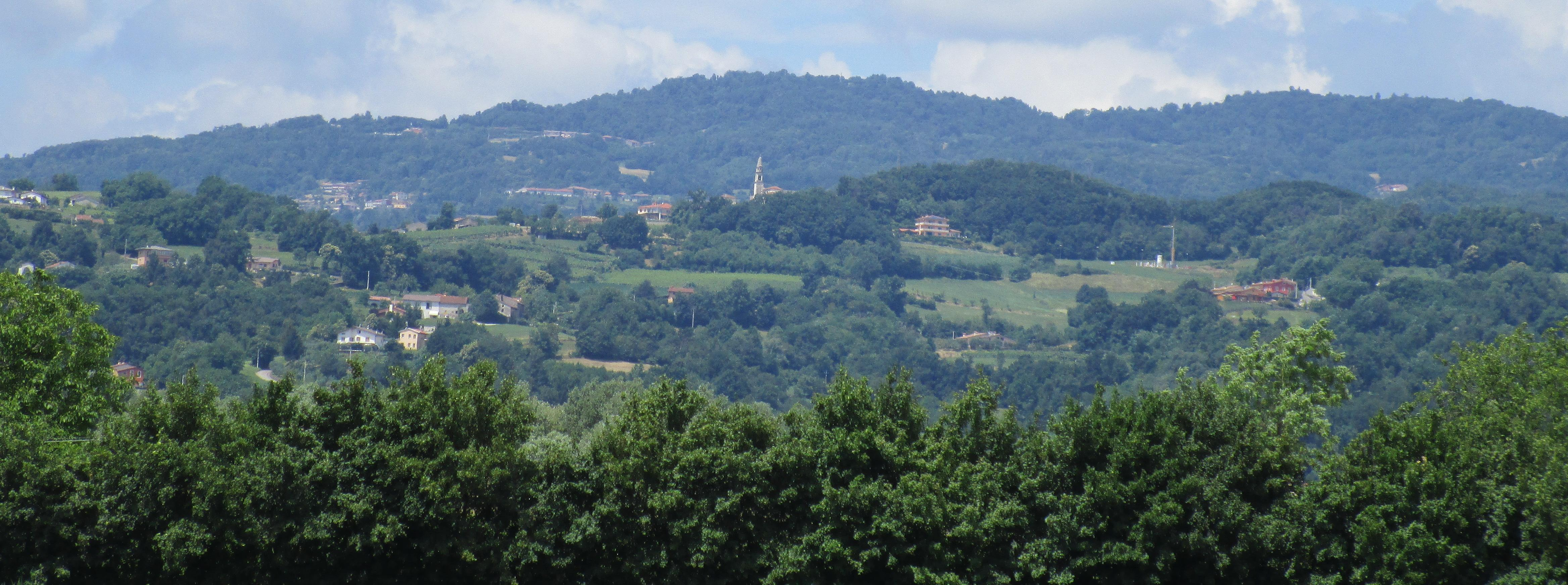 Ii campanile della frazione San Benedetto visto da Via Postale Vecchia.